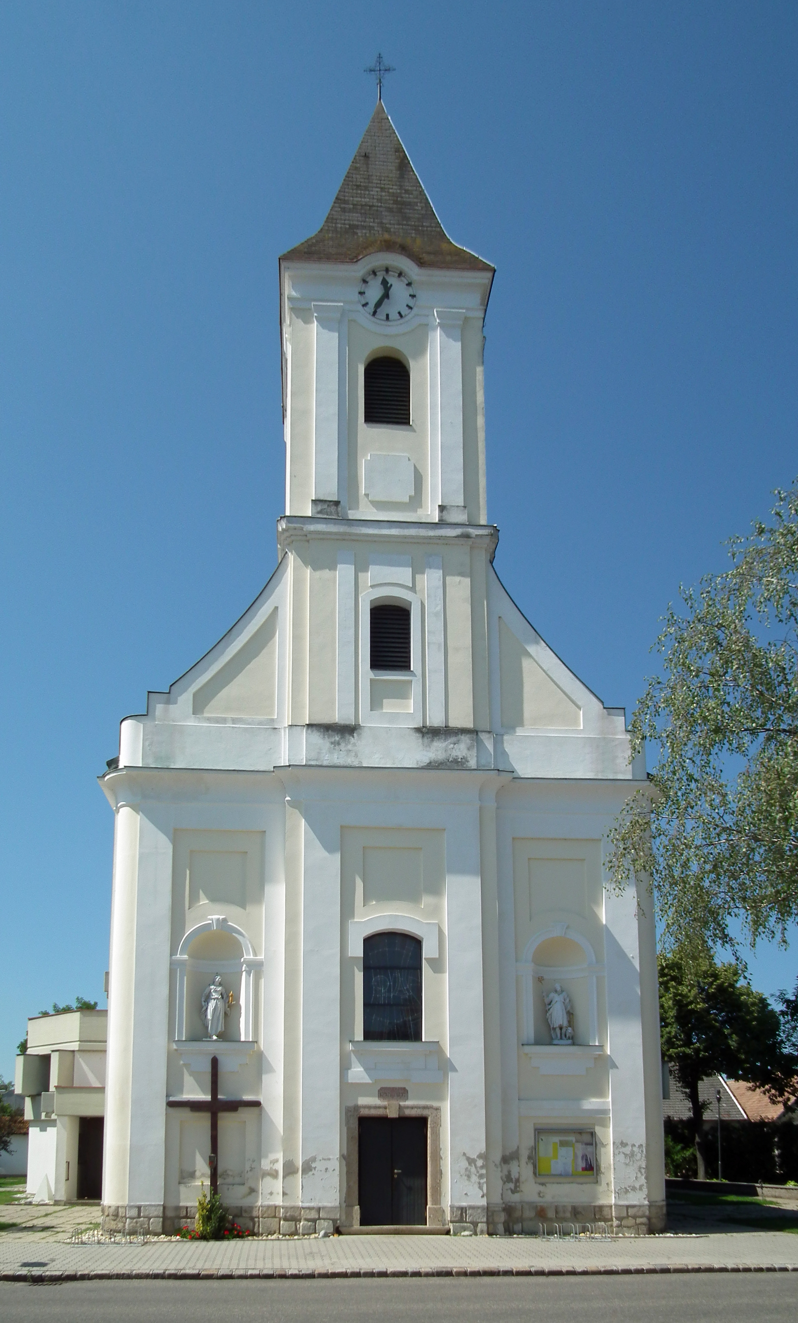 Pfarrkirche hl. Margaretha, Apetlon, Burgenland